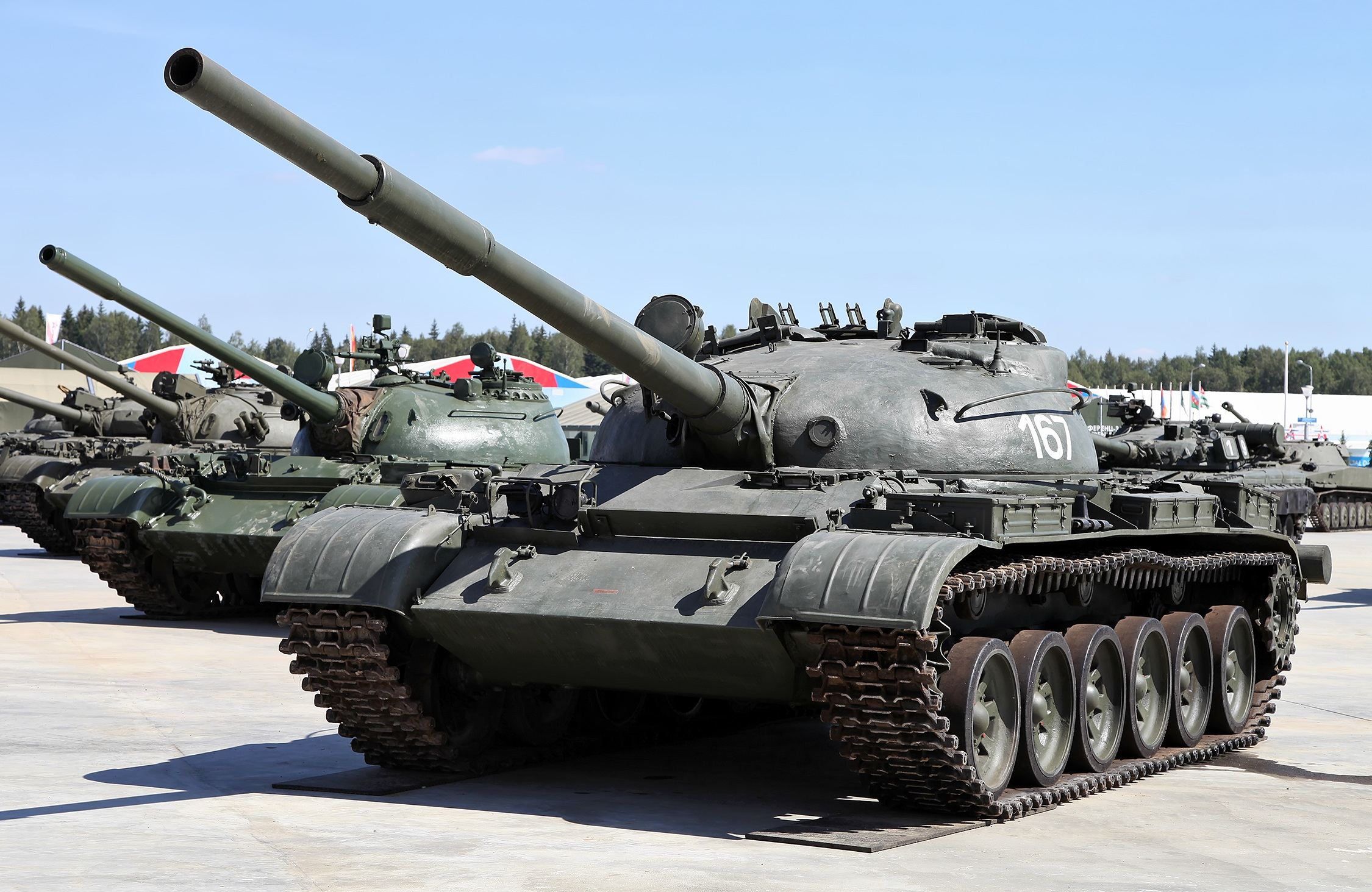 Опытный средний танк Объект 167 в экспозиции парка "Патриот"